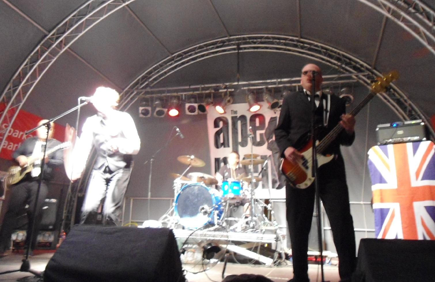 die Saarbrücker Mod-Band "The Apemen"